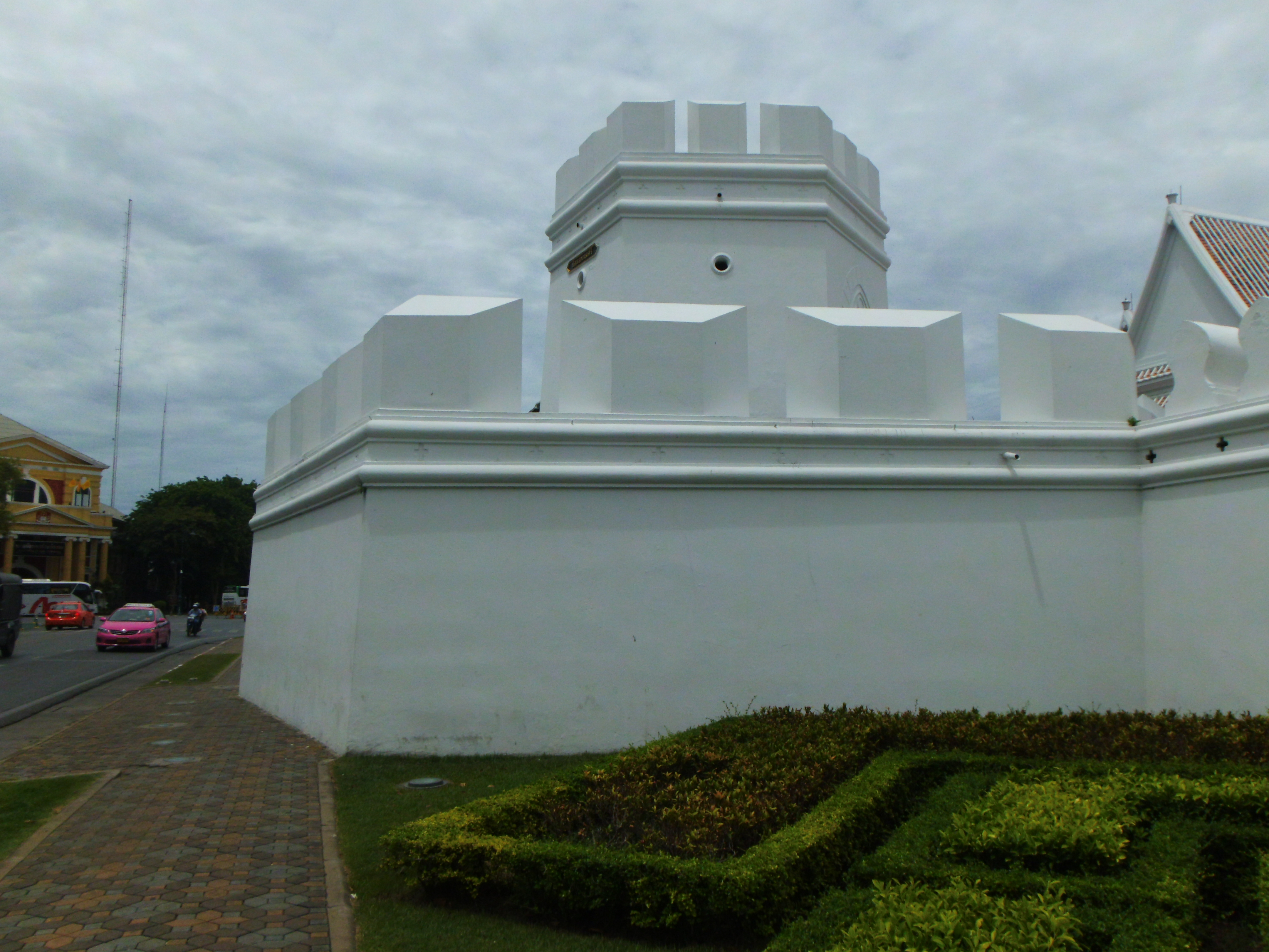 พระบรมมหาราชวังและวัดพระศรีรัตนศาสดาราม